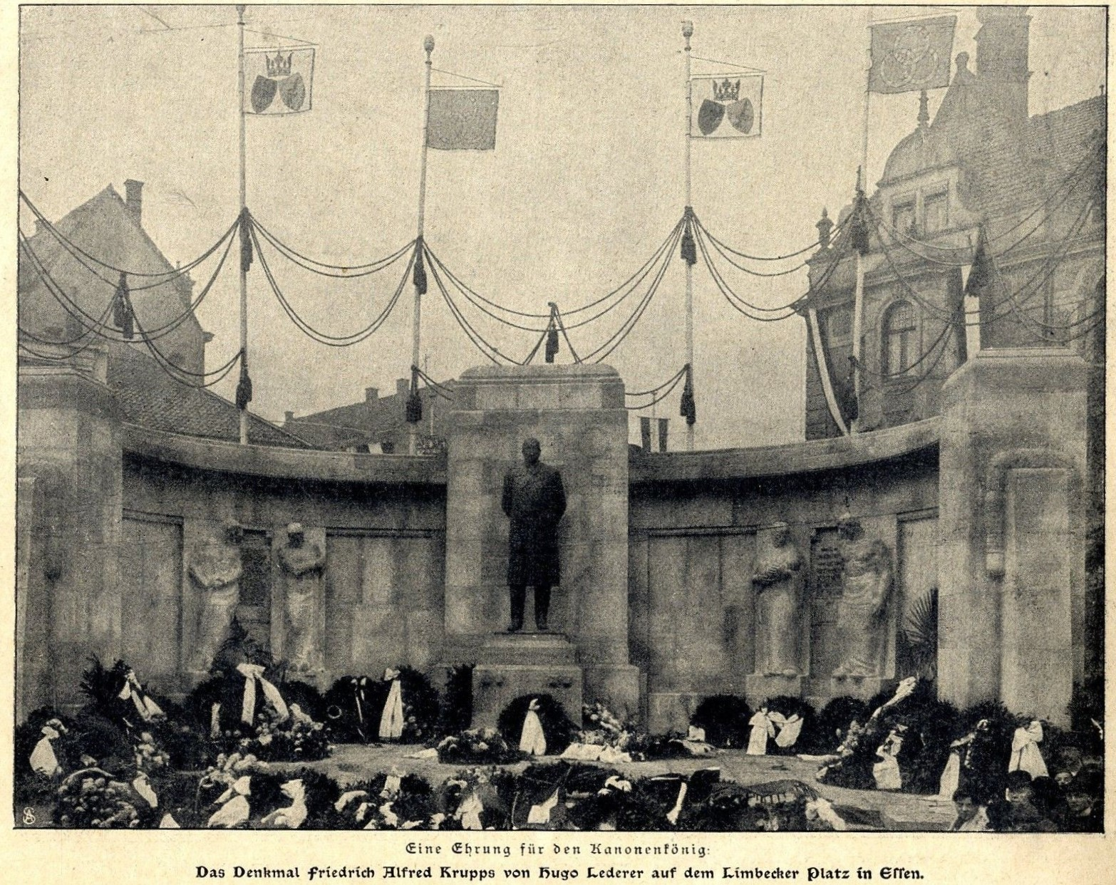 Enthüllung des Friedrich Alfred Krupp-Denkmals von Hugo Lederer auf dem Limbecker Platz in Essen, 1907